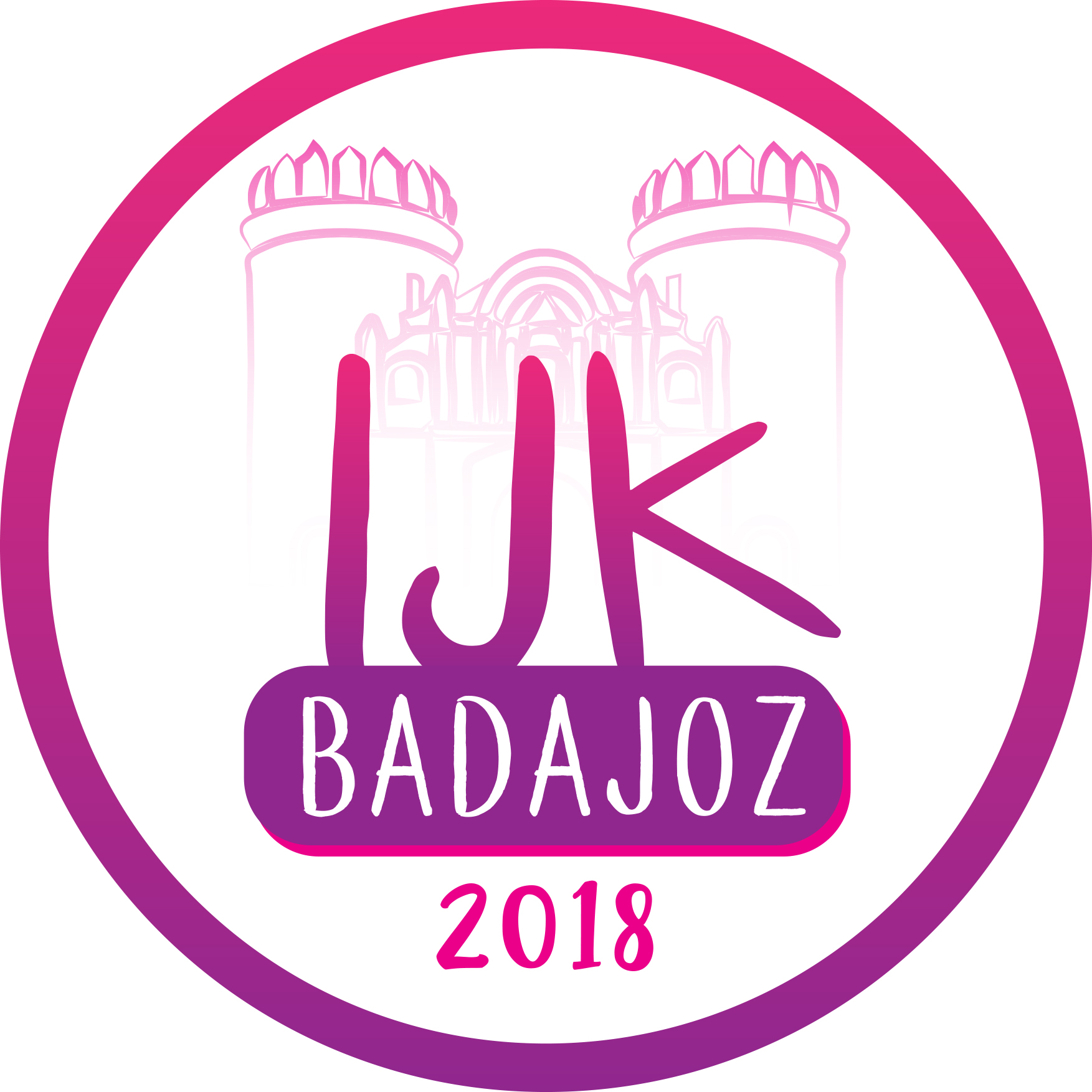 Emblemo de IJK 2018